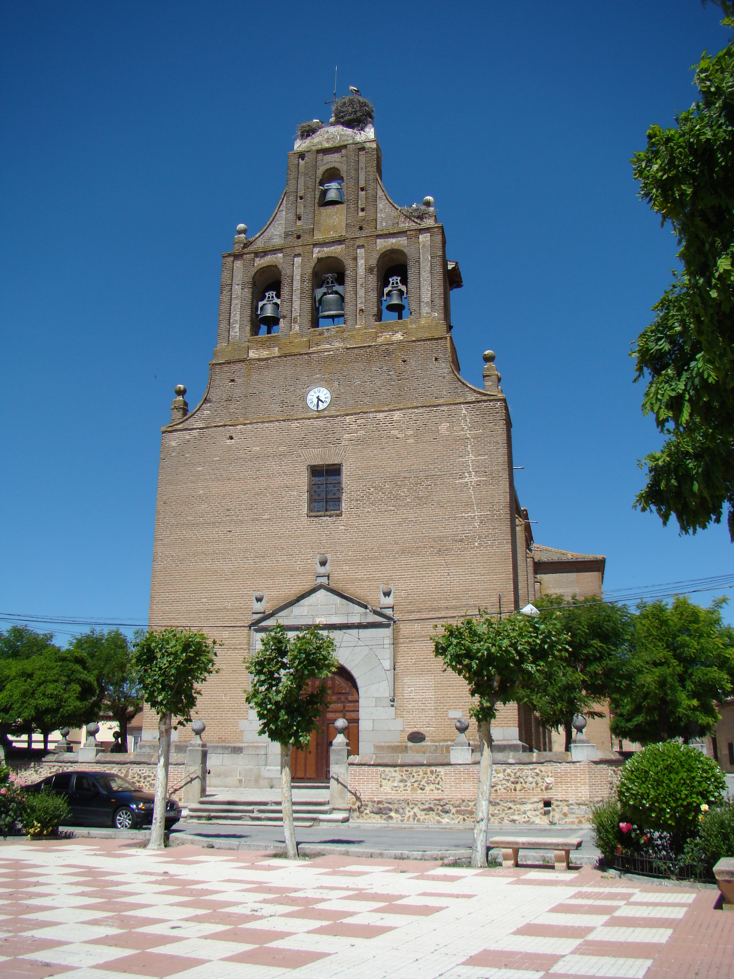 Municipio de Sangarcía en la provincia de Segovia. Iglesia de San Bartolomé, Bien de Interés Cultural.